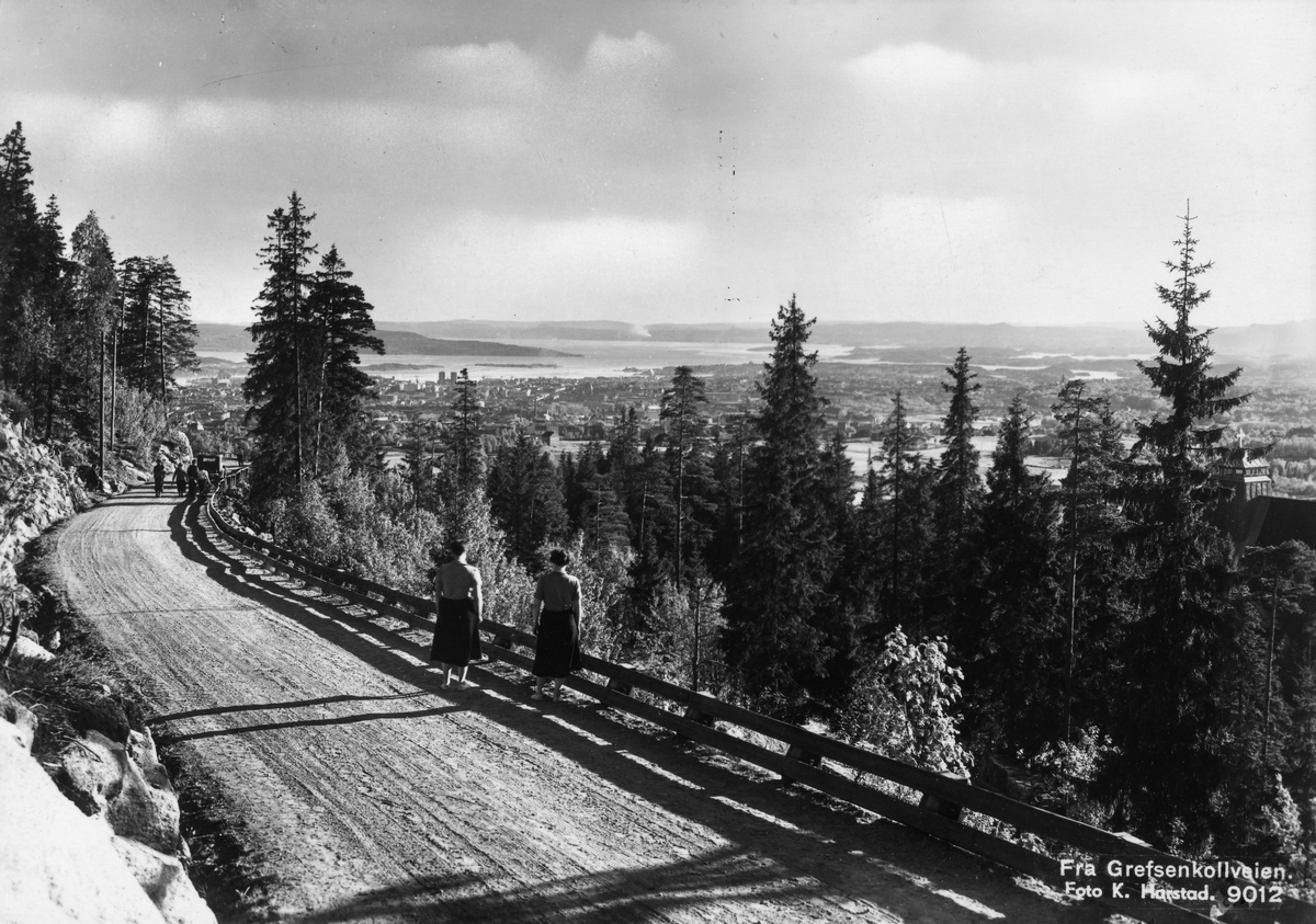 Grefsenkollveien ca. 1930 - 1940